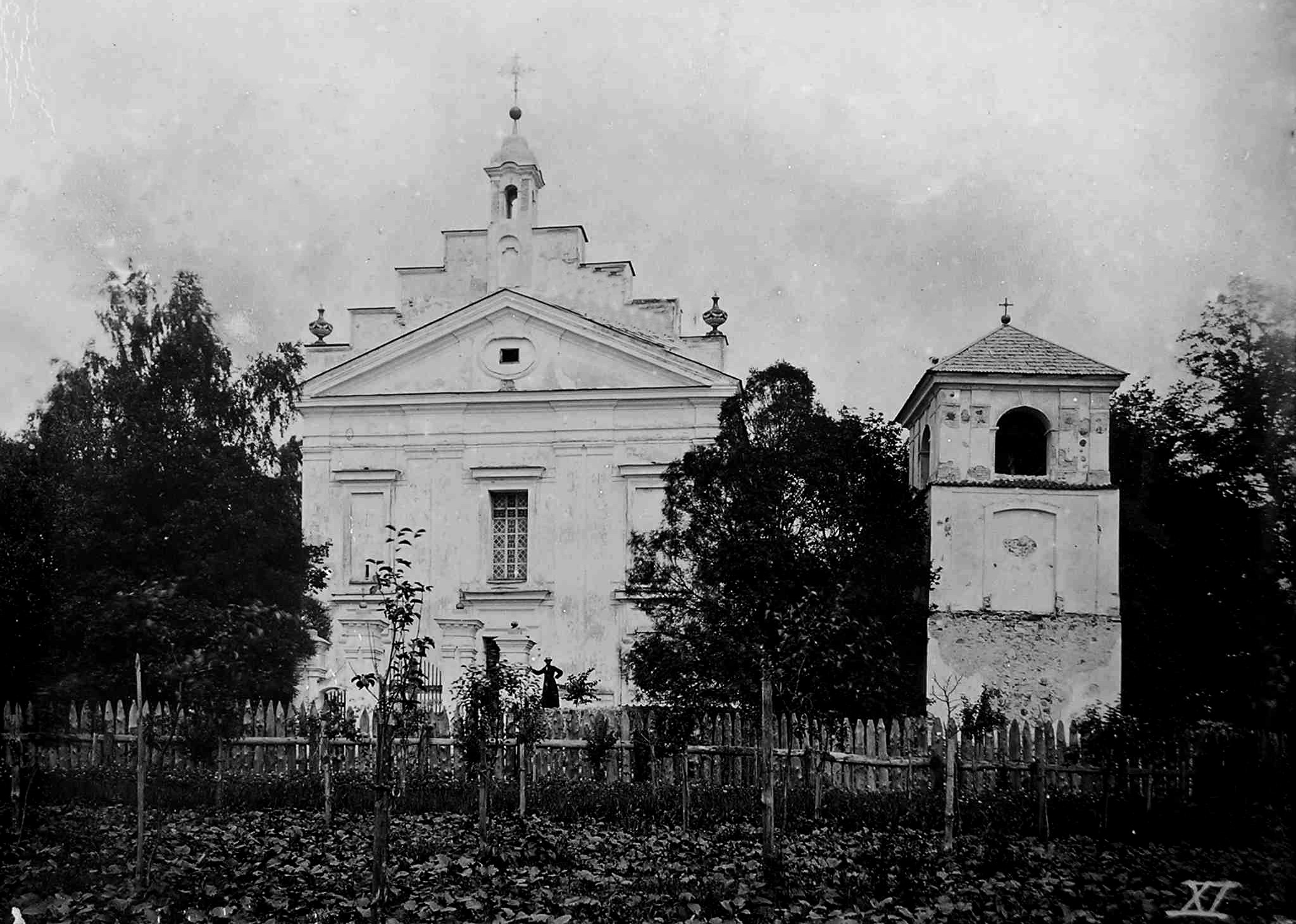 Беларуская (тарашкевіца): Сідра (Sidra). Касьцёл Найсьвяцейшай Тройцы